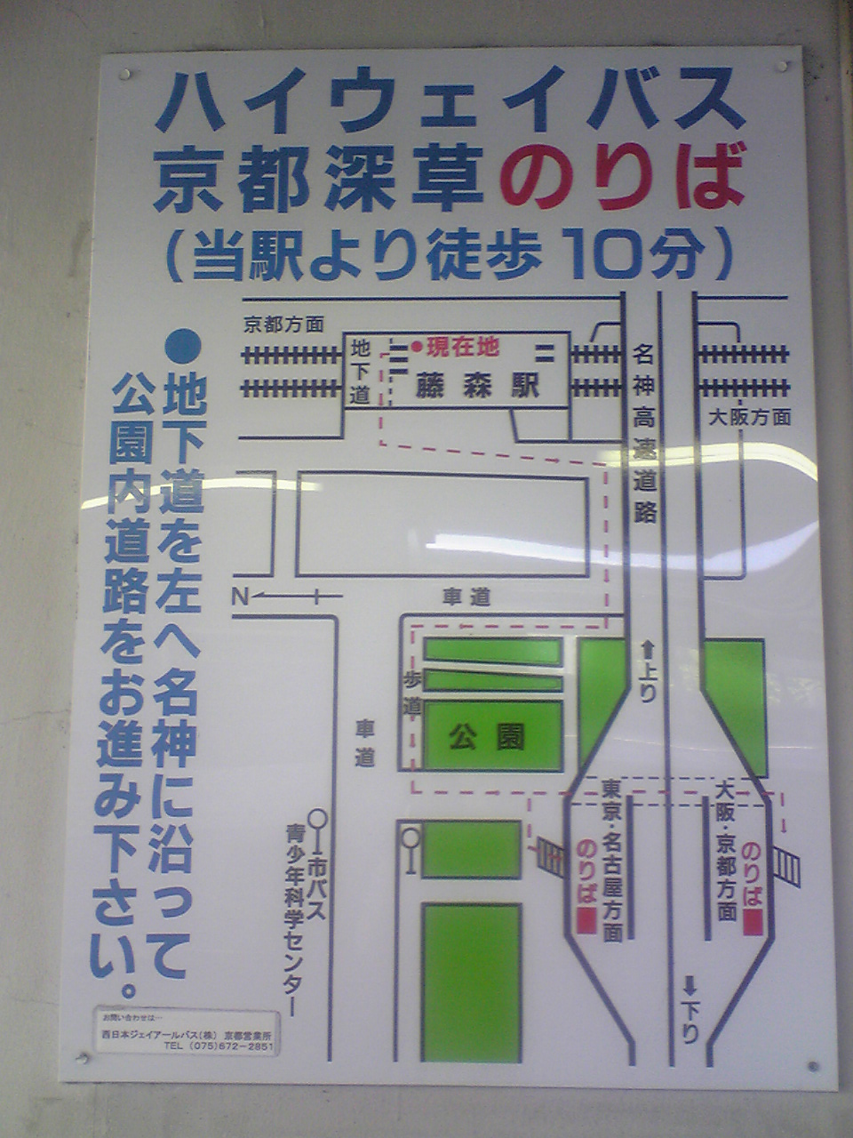 京阪電鉄藤森駅改札口付近にある深草バスストップへの案内図